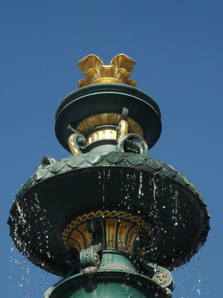 Kašna v Karviné Fryštátě